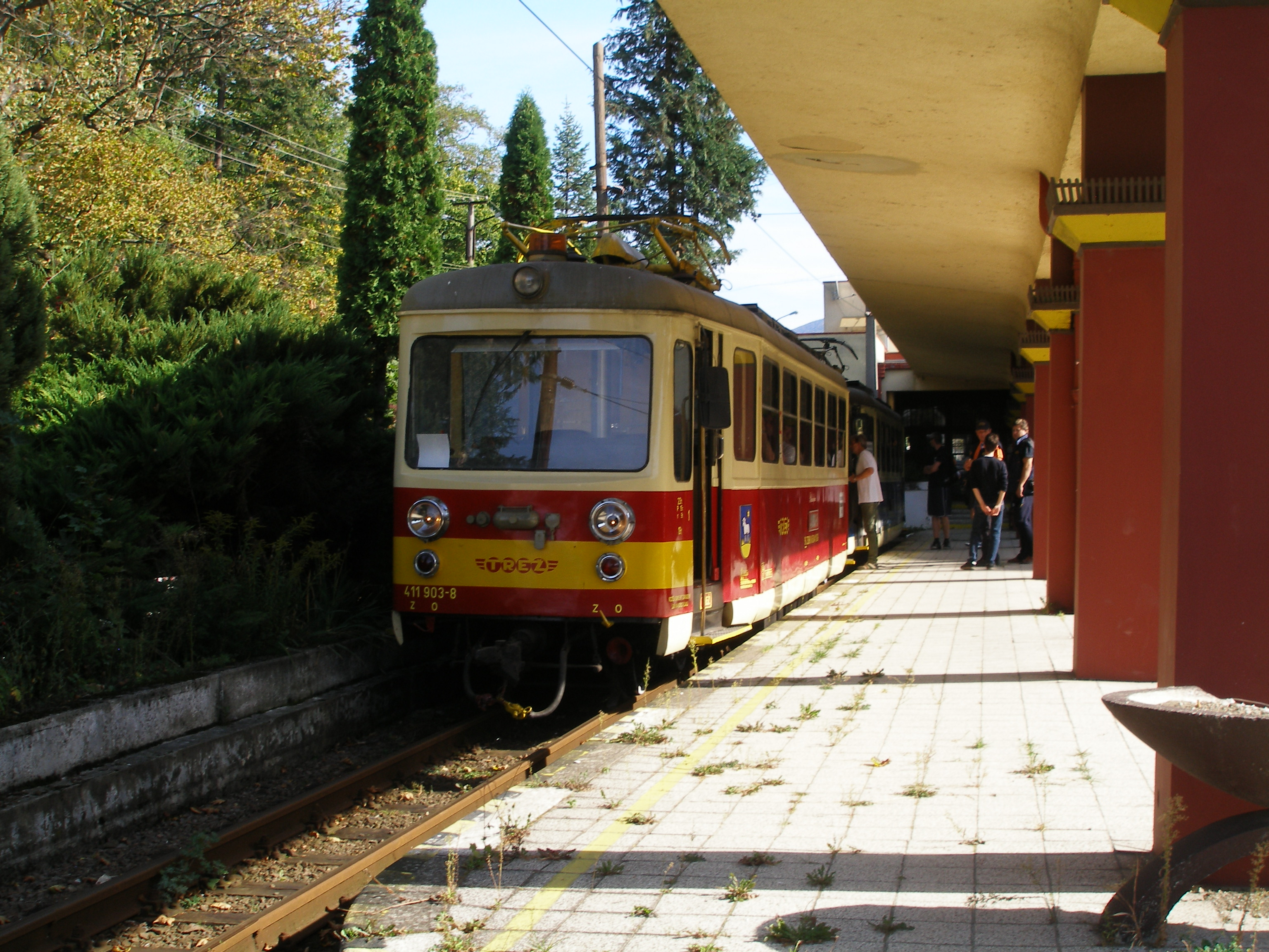 Vůz električky číslo 411 903-8 v zastávce v Trenčianských Teplicích.